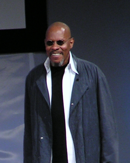 Avery Brooks in 2007